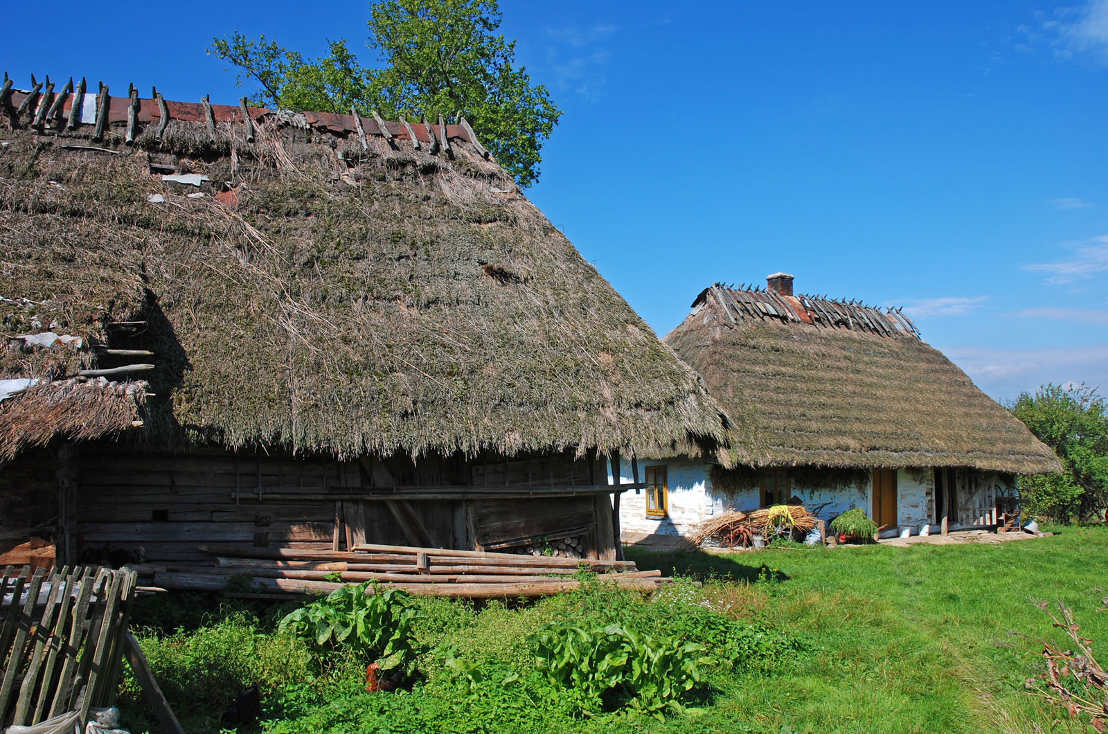 Żohatyn? czy Jawornik Ruski? (Poland), Cottage and barn